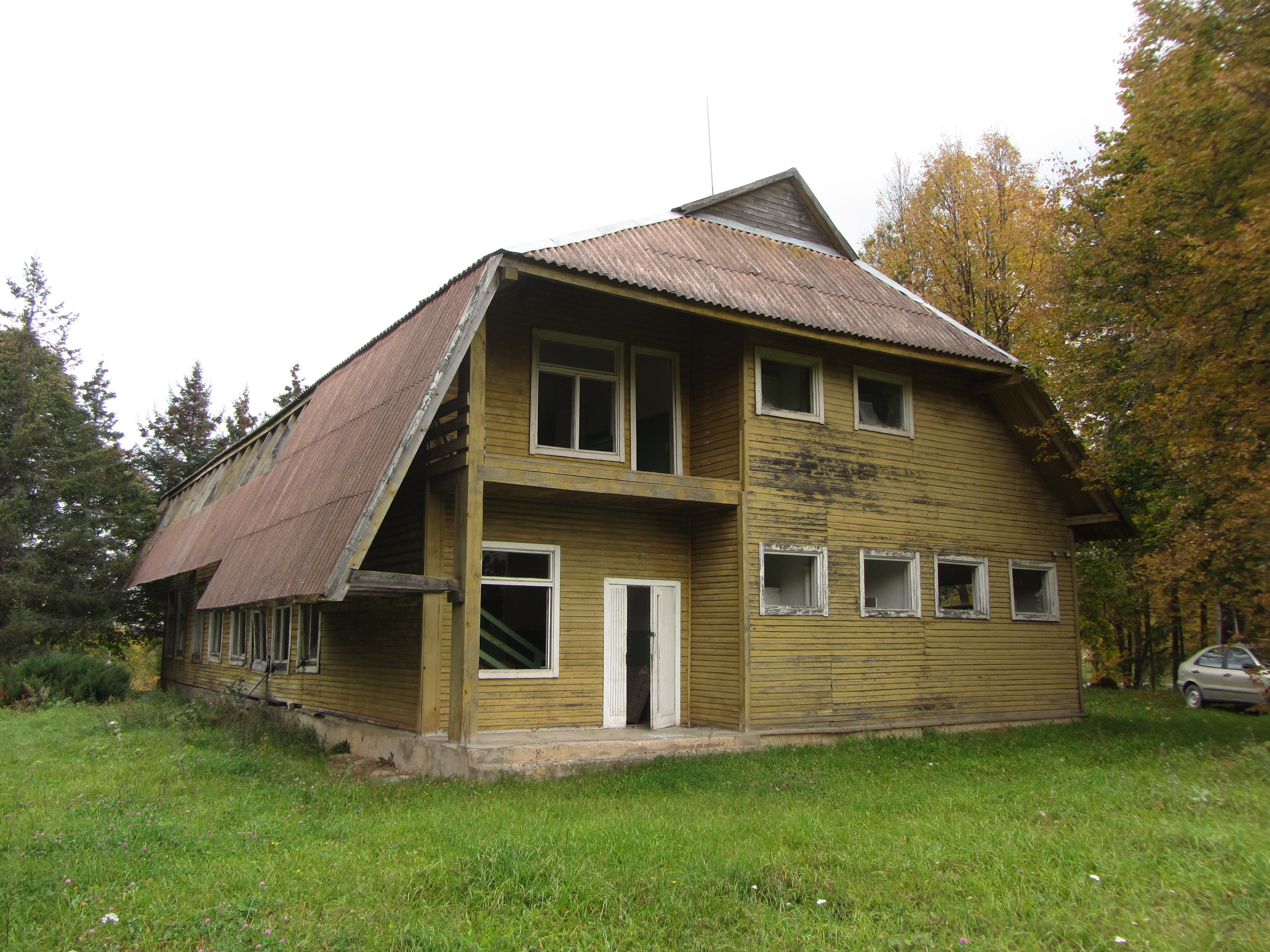 Kriaunų sen., Lithuania